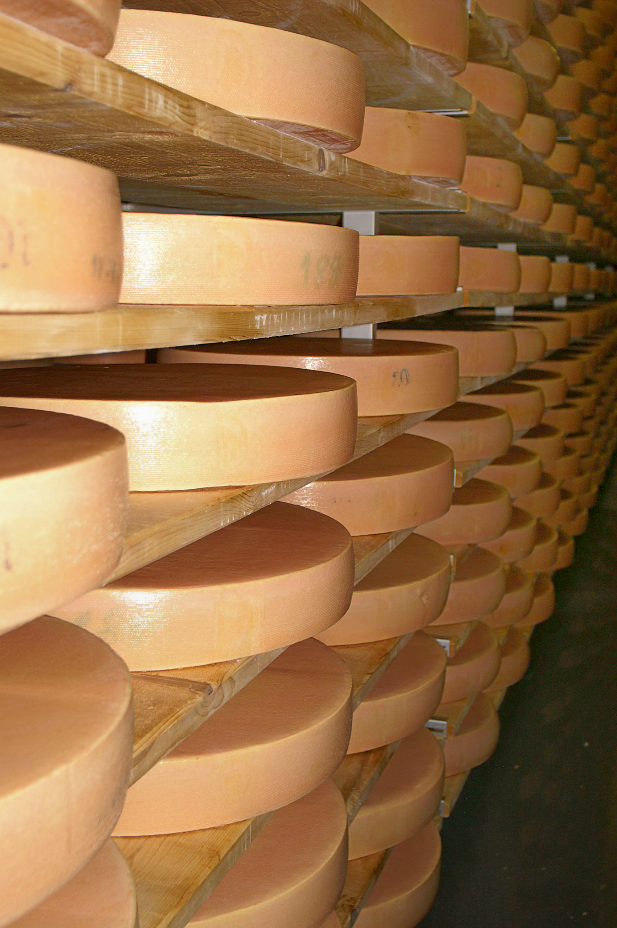 der Bregenzerwälder Käsekeller in Lingenau im Bregenzerwald gehört der Käsestraße Bregenzerwald an. “Danke an Mario für die Erlaubnis, das Bildmaterial für die Wikipedia und der Wiki Commons zu veröffentlichen”